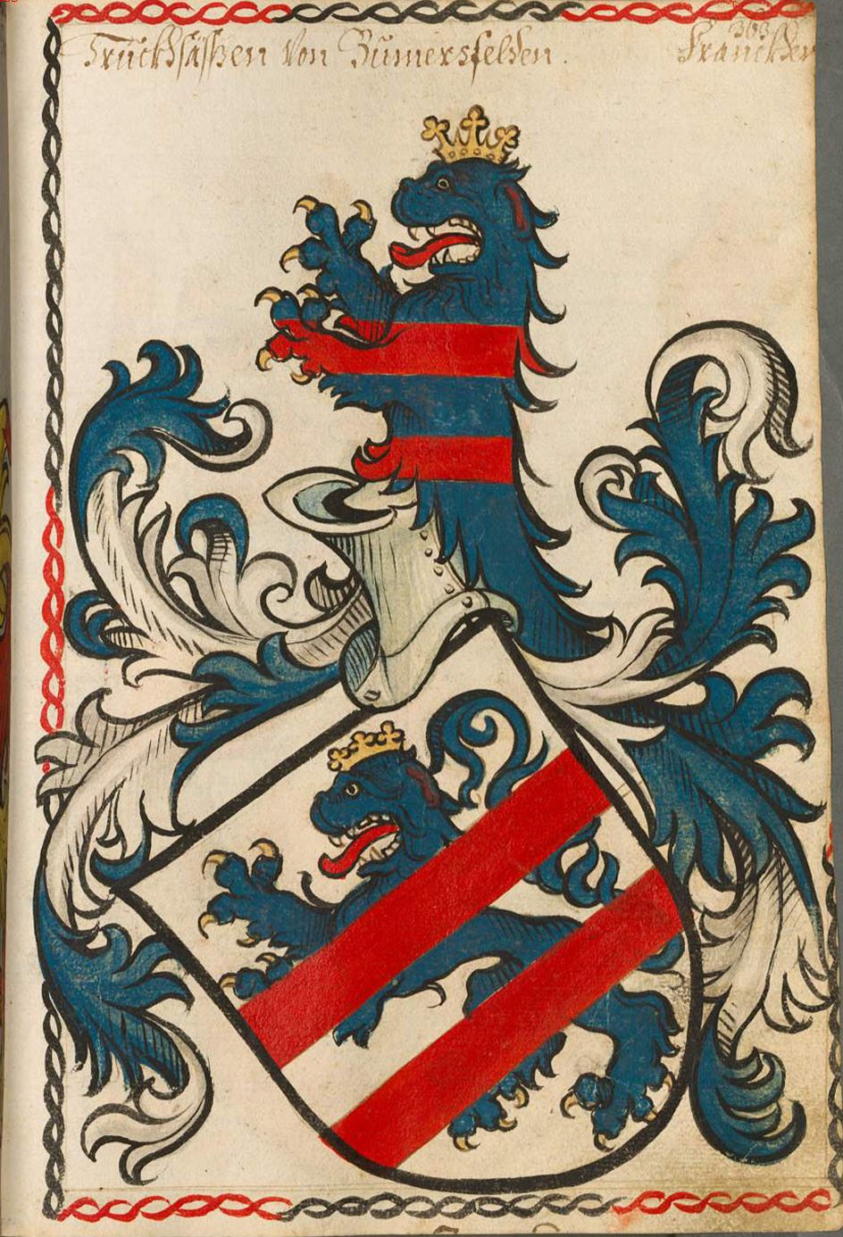 Scheibler'sches Wappenbuch , älterer Teil Pommersfelden